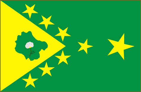 Bandeira cedroce